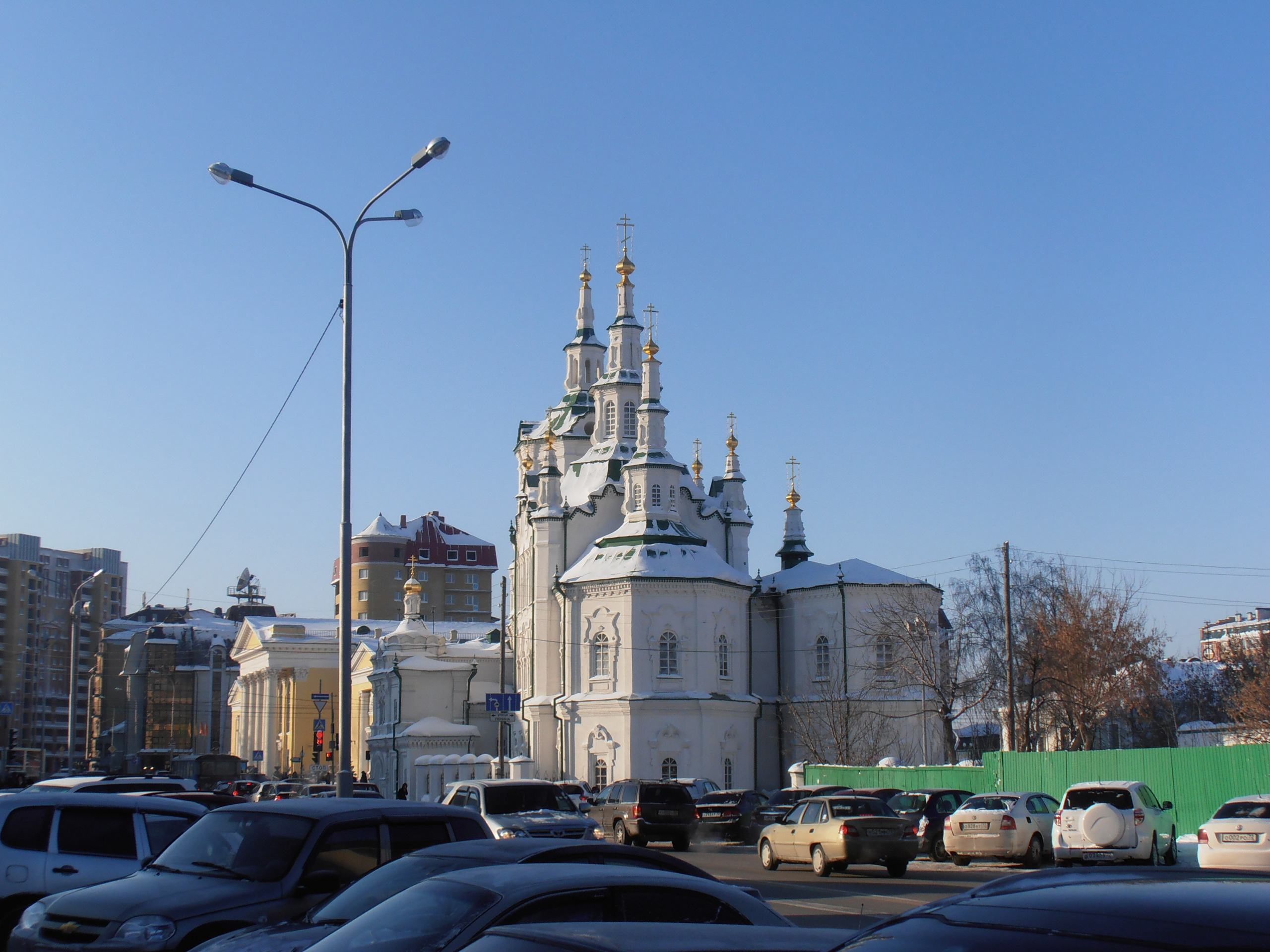 Вид на Спасскую церковь в Тюмени со стороны улиц Республики и Челюскинцев.